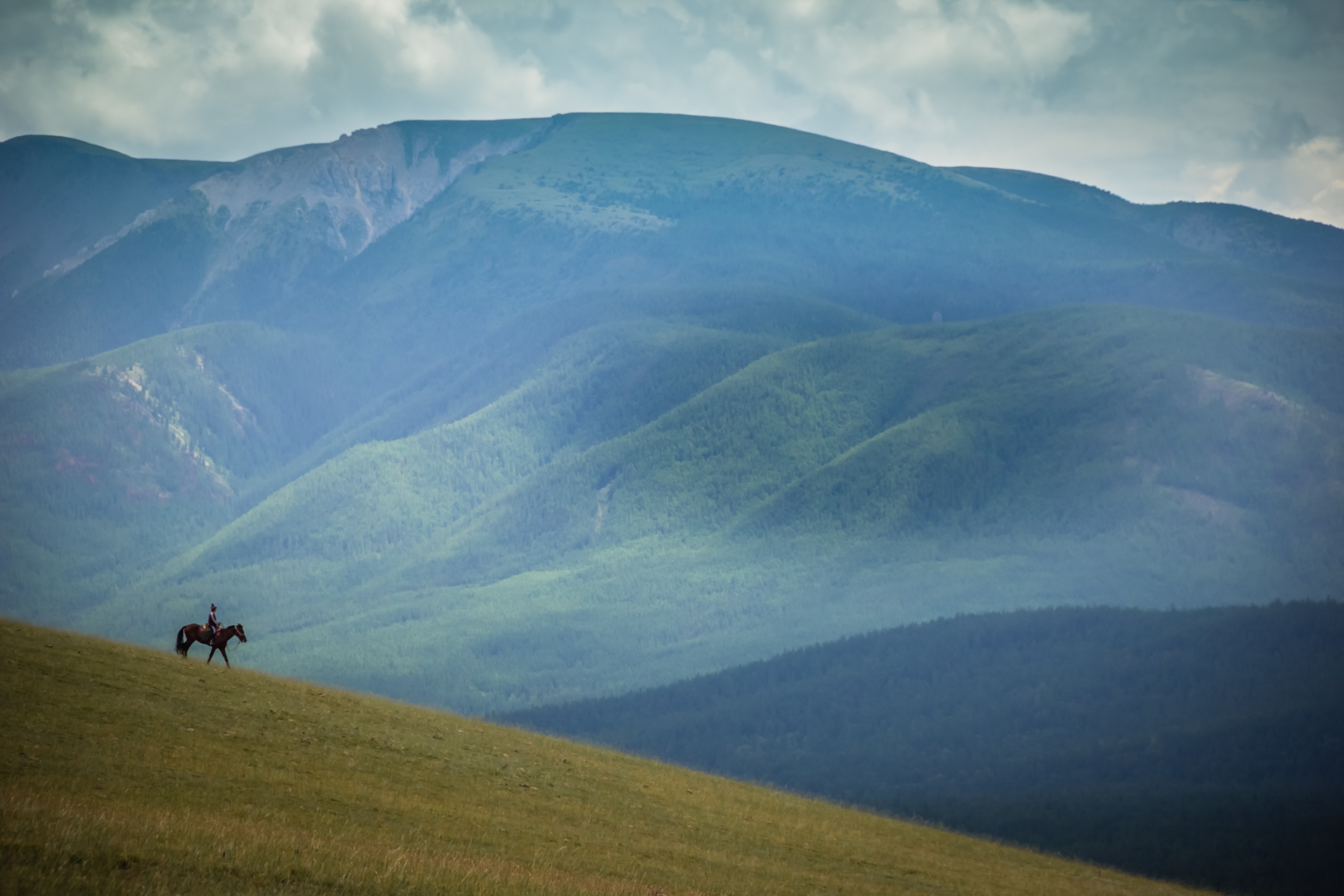 пейзаж Чеди-Хольский район Тувы